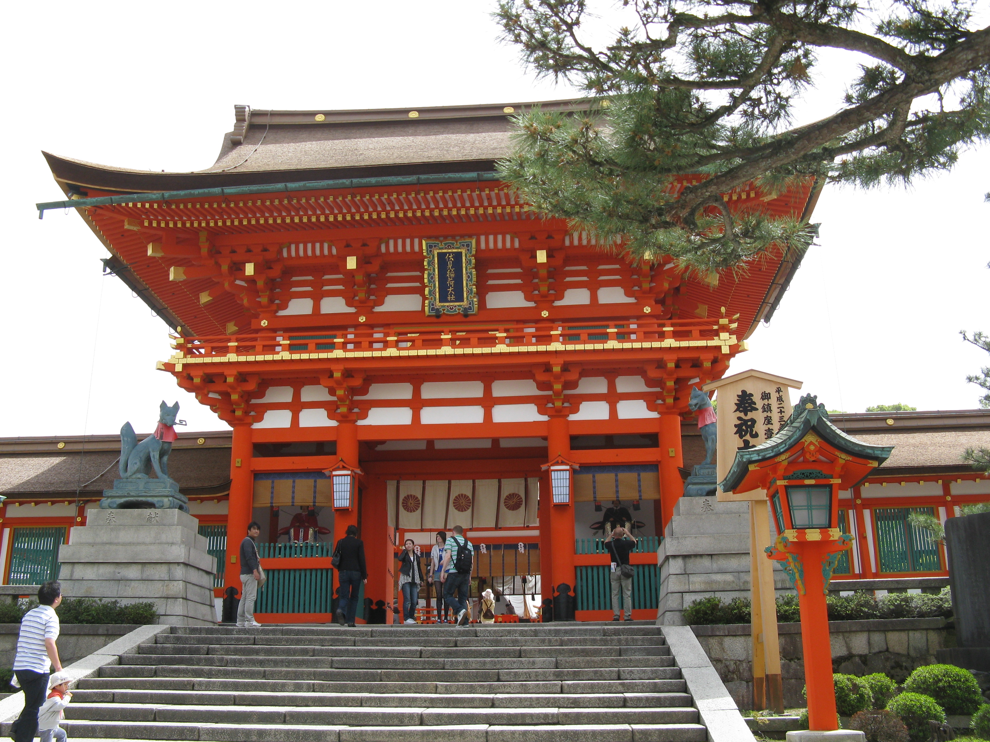 伏見稲荷大社 楼門